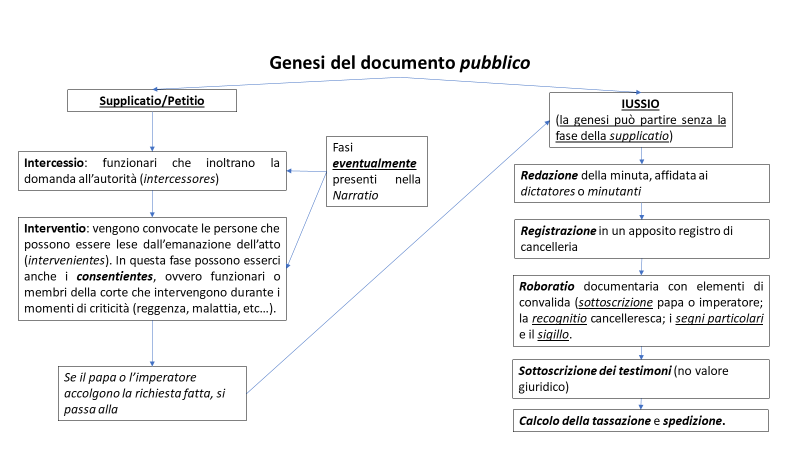 Genesi del documento pubblico (prodotto ovvero dalla cancelleria imperiale/regia e papale) secondo la scienza diplomatistica.